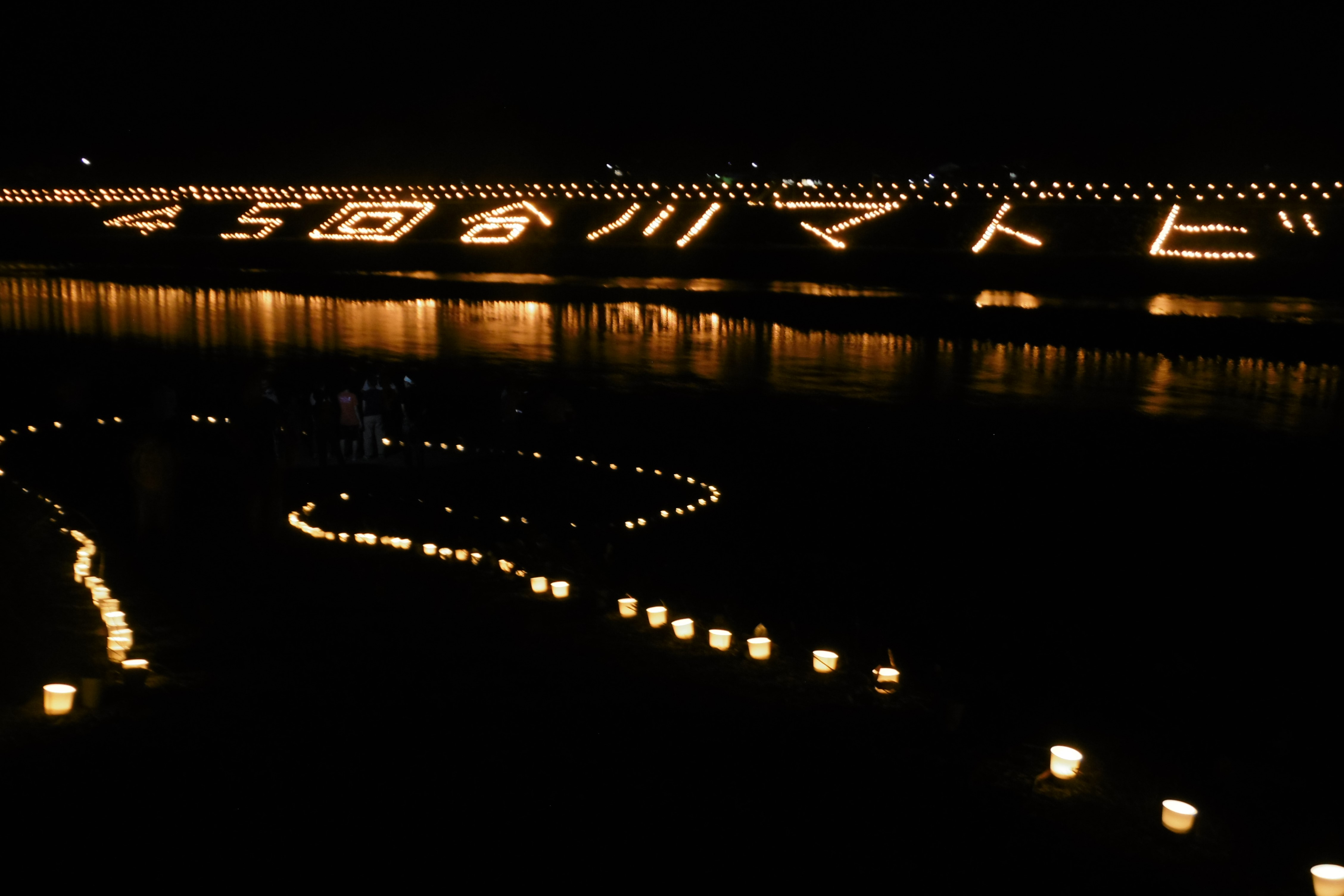 合川まと火